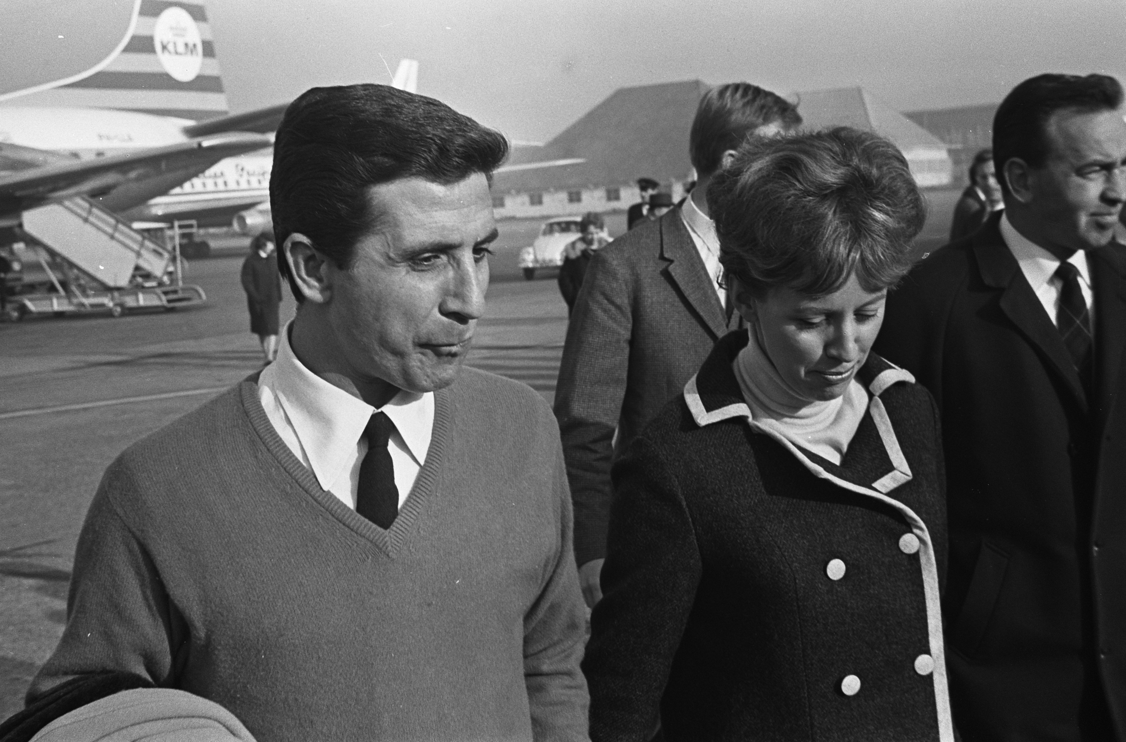 Collectie / Archief : Fotocollectie Anefo Reportage / Serie : Aankomst van de Franse zanger Gilbert Bécaud op Schiphol Beschrijving : Gilbert Bécaud en de journaliste Merel Laseur Datum : 26 oktober 1965 Locatie : Noord-Holland, Schiphol Trefwoorden : zangers Persoonsnaam : Bécaud, Gilbert, Laseur, Merel Fotograaf : Joost Evers / Anefo Auteursrechthebbende : Nationaal Archief Materiaalsoort : Negatief (zwart/wit) Nummer archiefinventaris : bekijk toegang 2.24.01.05 Bestanddeelnummer : 918-3637